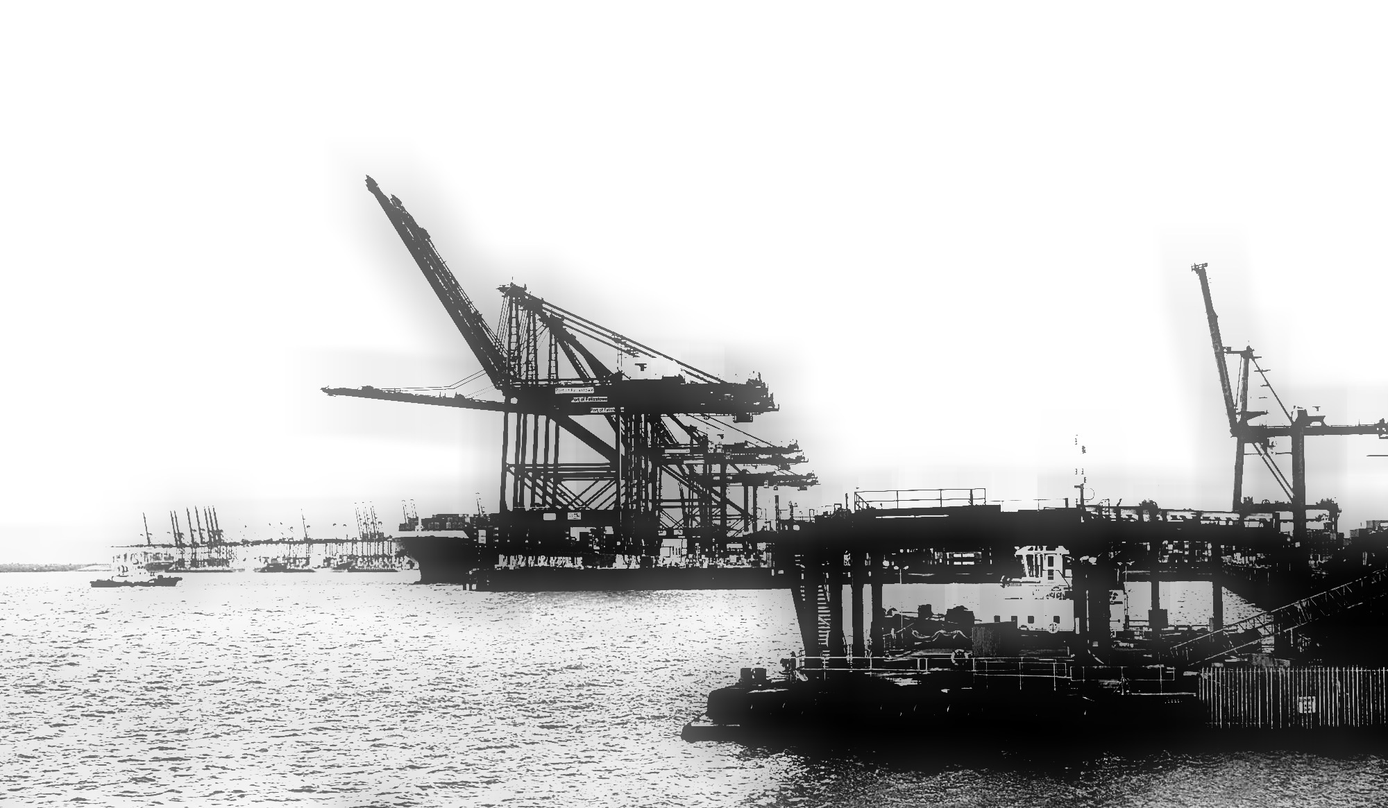 Felixstowe Docks.